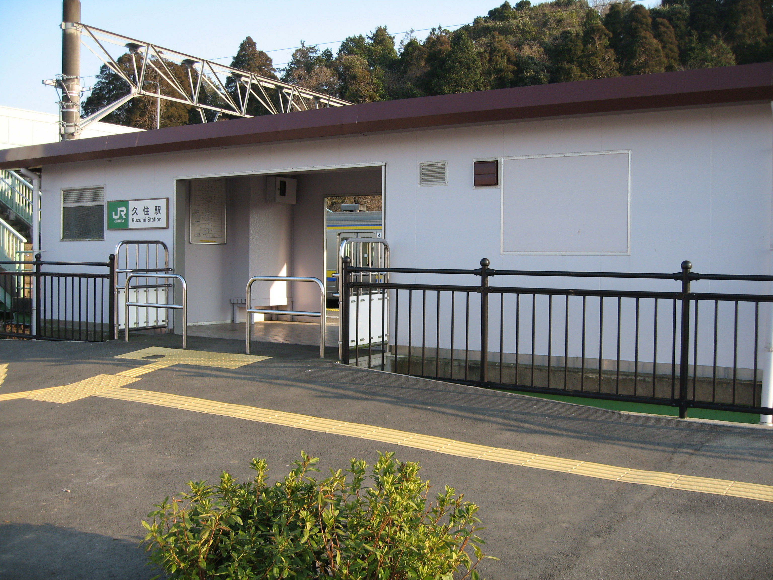 Kuzumi Station, Narita Line, Chiba, Japan, 久住駅駅舎